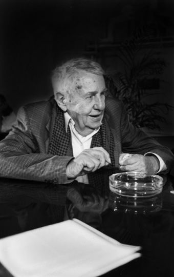 Portrait Hans Werner Richter